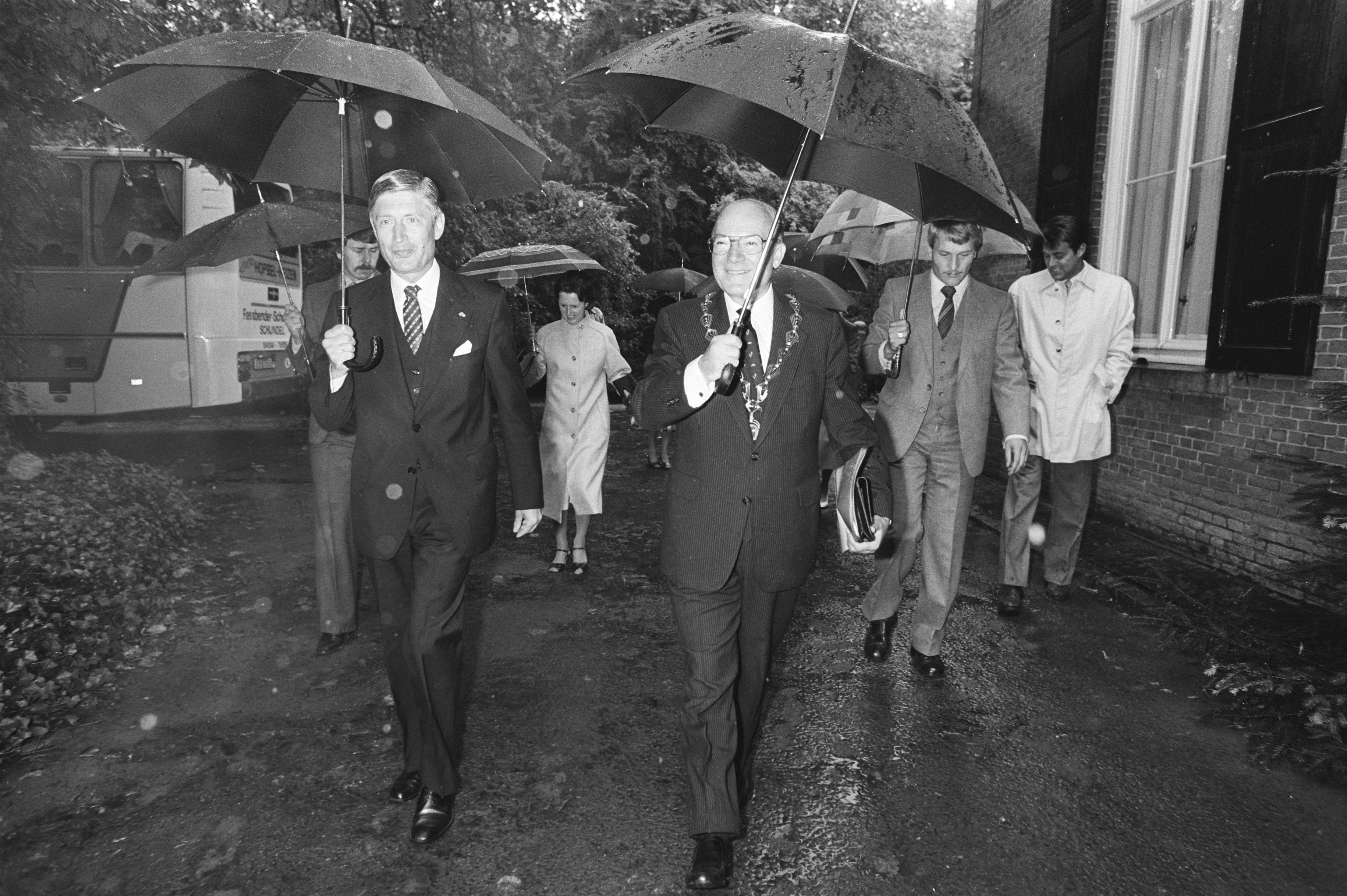 Collectie / Archief : Fotocollectie Anefo Reportage / Serie : Premier Van Agt benoemd tot ereburger van zijn geboorteplaats Geldrop. Middenparaplu: burgemeester van Geldrop Louis van Erp. Beschrijving : ereburgers, ministers-presidenten Datum : 30 augustus 1980 Locatie : Geldrop, Noord-Brabant Trefwoorden : ereburgers, ministers-presidenten Persoonsnaam : Agt, Dries van Fotograaf : Croes, Rob C. / Anefo Auteursrechthebbende : Nationaal Archief Materiaalsoort : Negatief (zwart/wit) Nummer archiefinventaris : bekijk toegang 2.24.01.05 Bestanddeelnummer : 930-9901